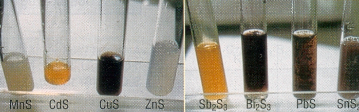 Niederschläge von Schwermetallsulfiden, Analytische Chemie